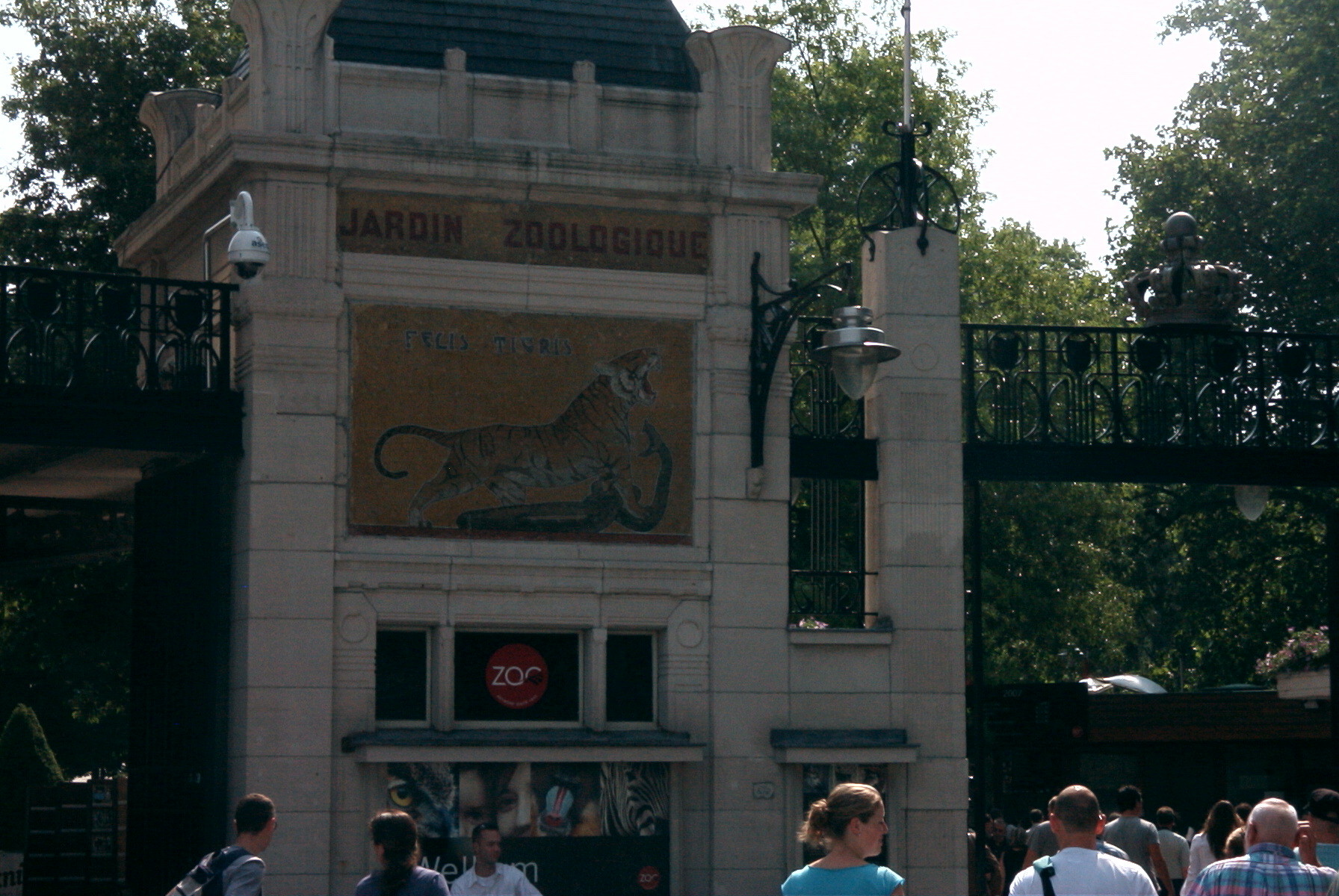 Állatkert bejárata, Antwerpen, Belgium